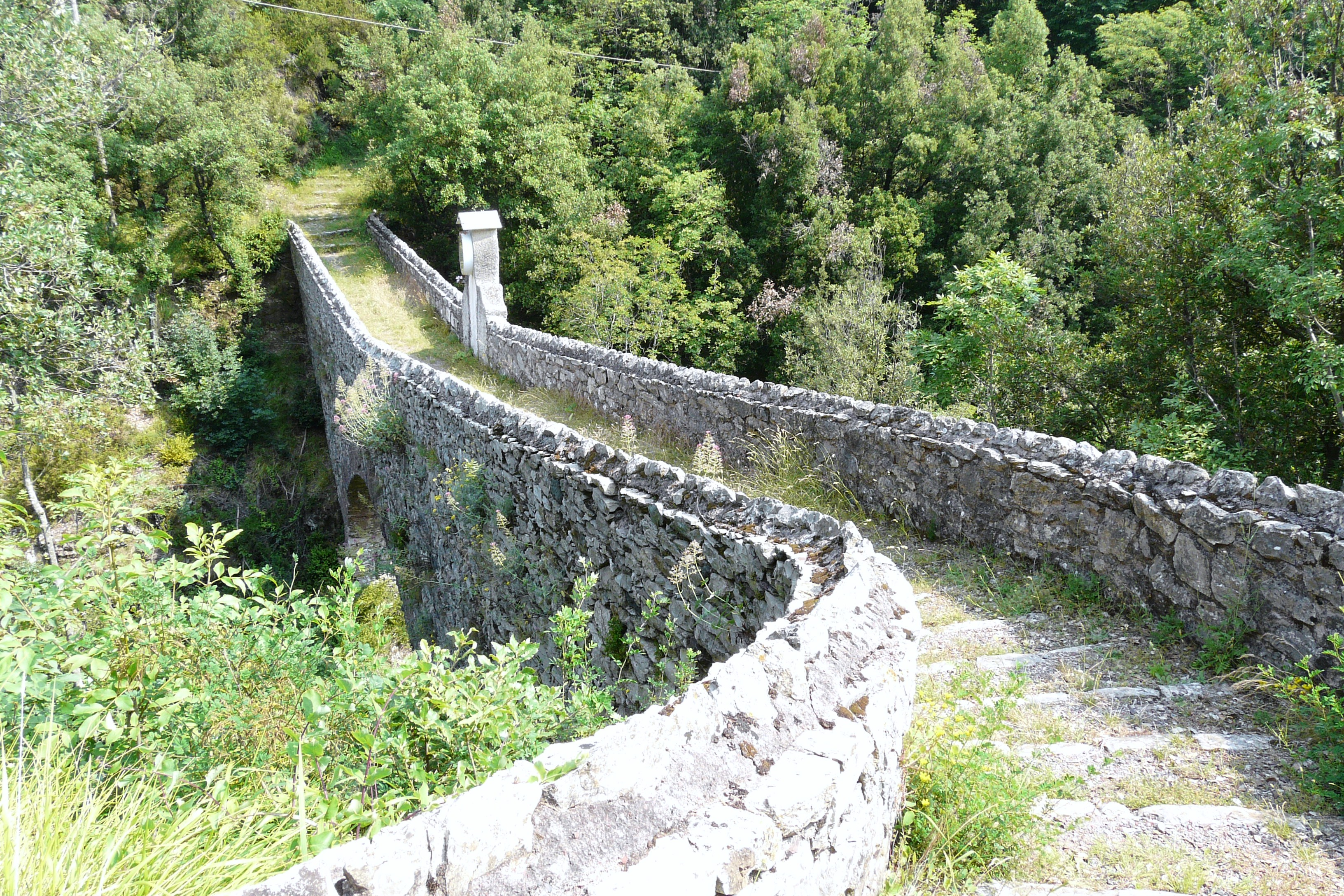 Ponte tra i borghi di Nascio e Cassagna, Ne, Liguria, Italia